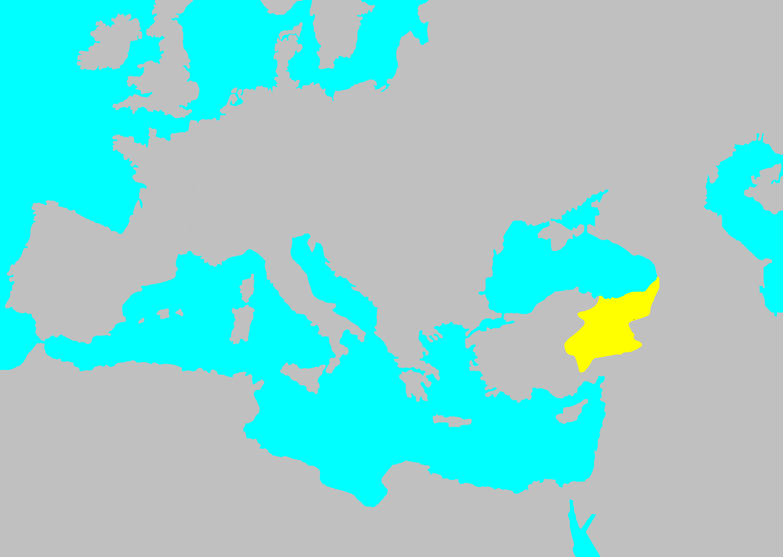 == Границы провинции Каппадокия в составе Римской империи